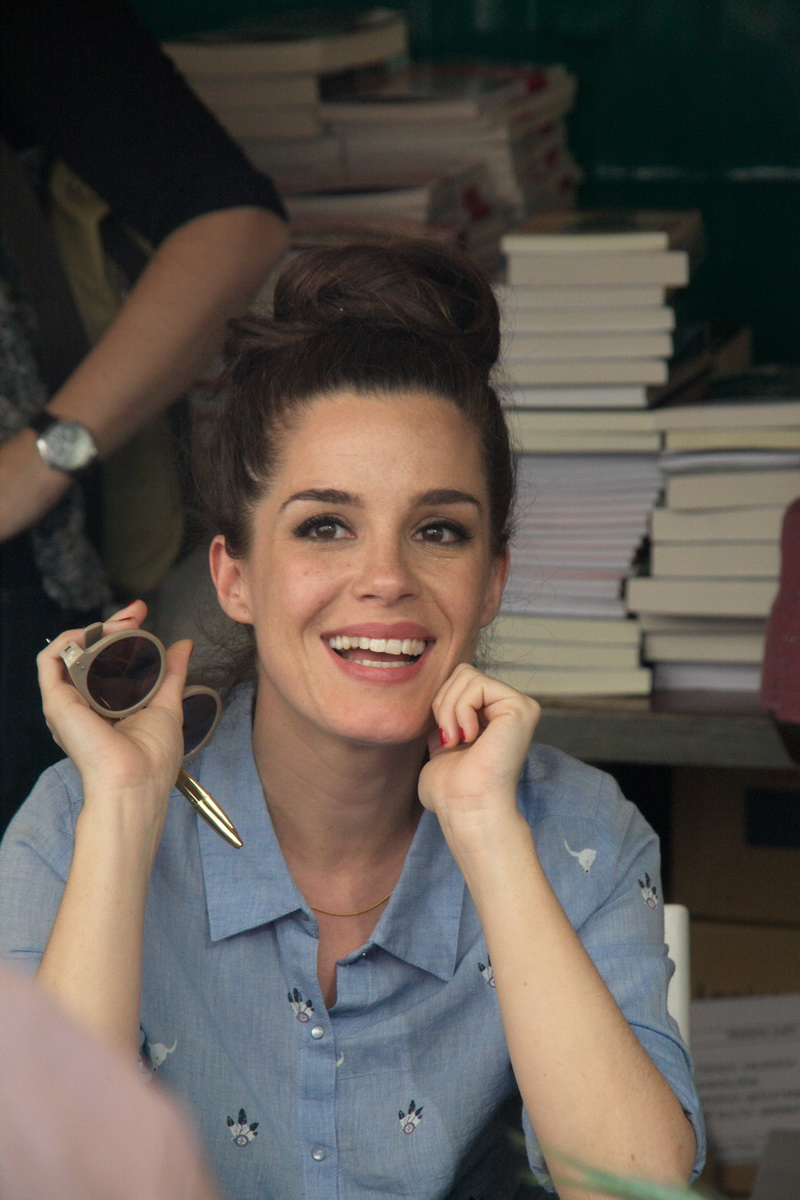 Signatura de llibres en la Diada de Sant Jordi-2015 a Barcelona